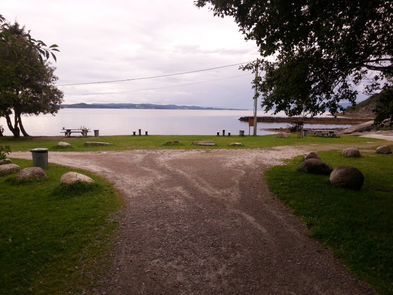 Paradisbukta i Steinkjer